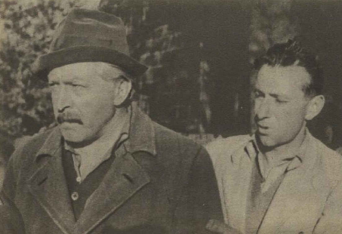 Jiří Weiss (1913-2004), český režisér a scenárista